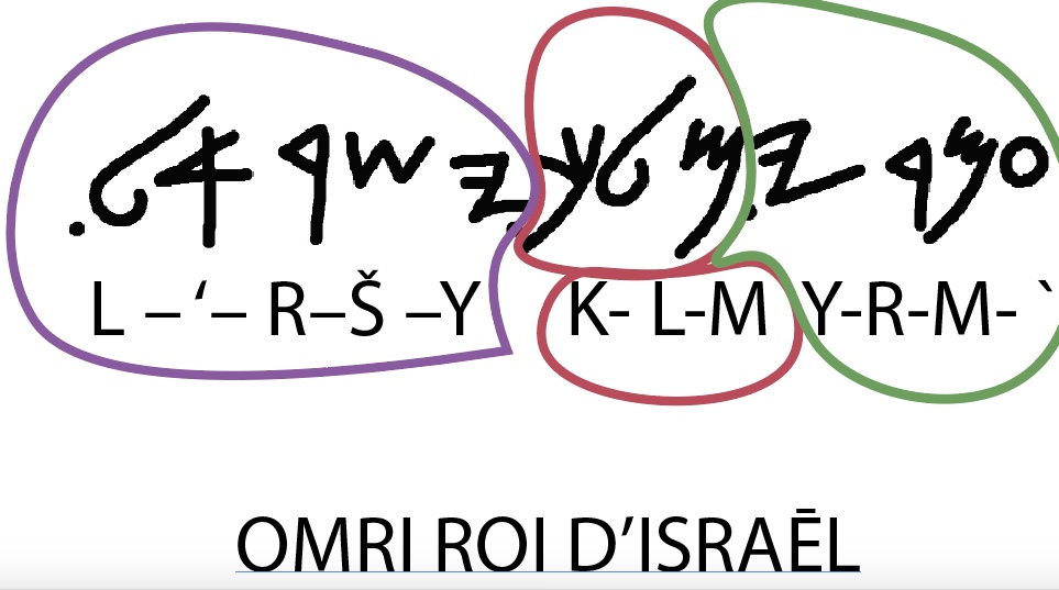 Omri roi d'israël traduit